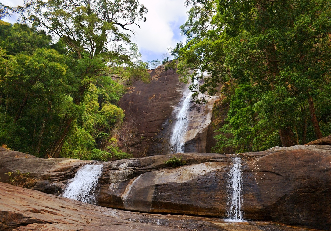 ബോണക്കാട് വെള്ളച്ചാട്ടം